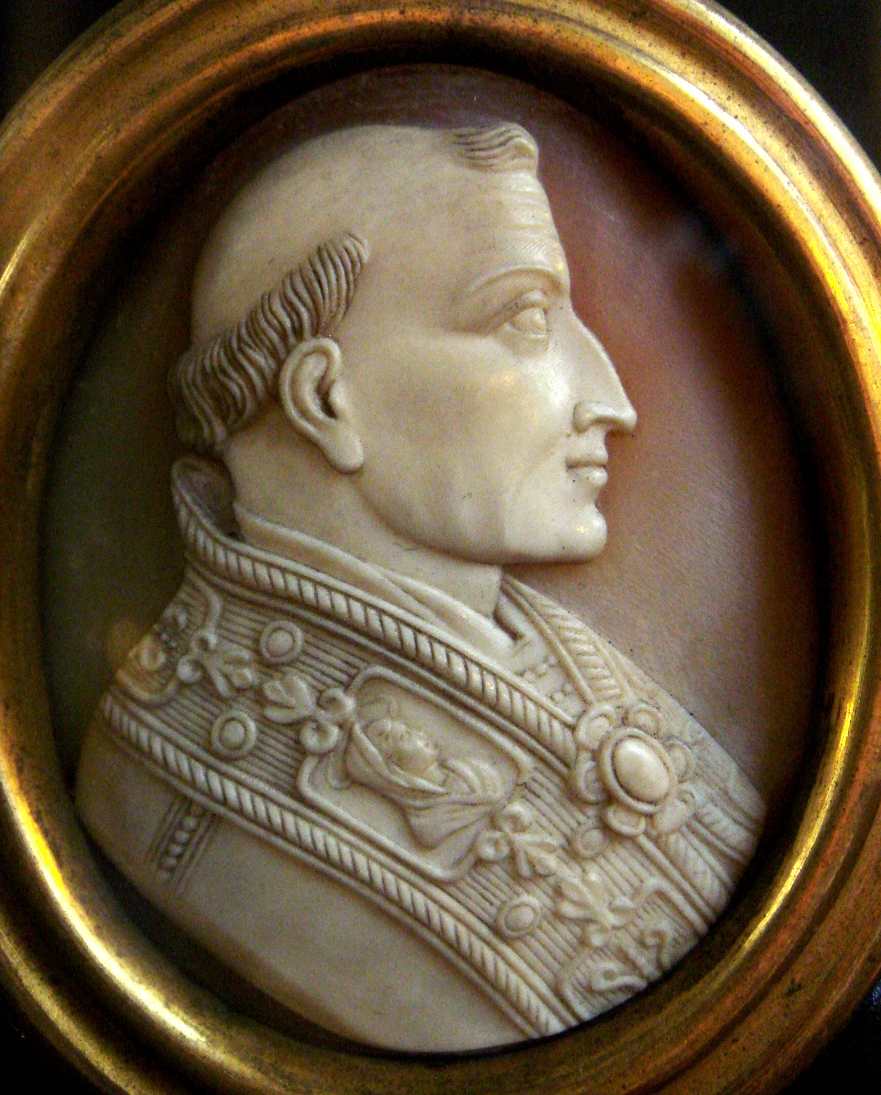 Pope Urban IV